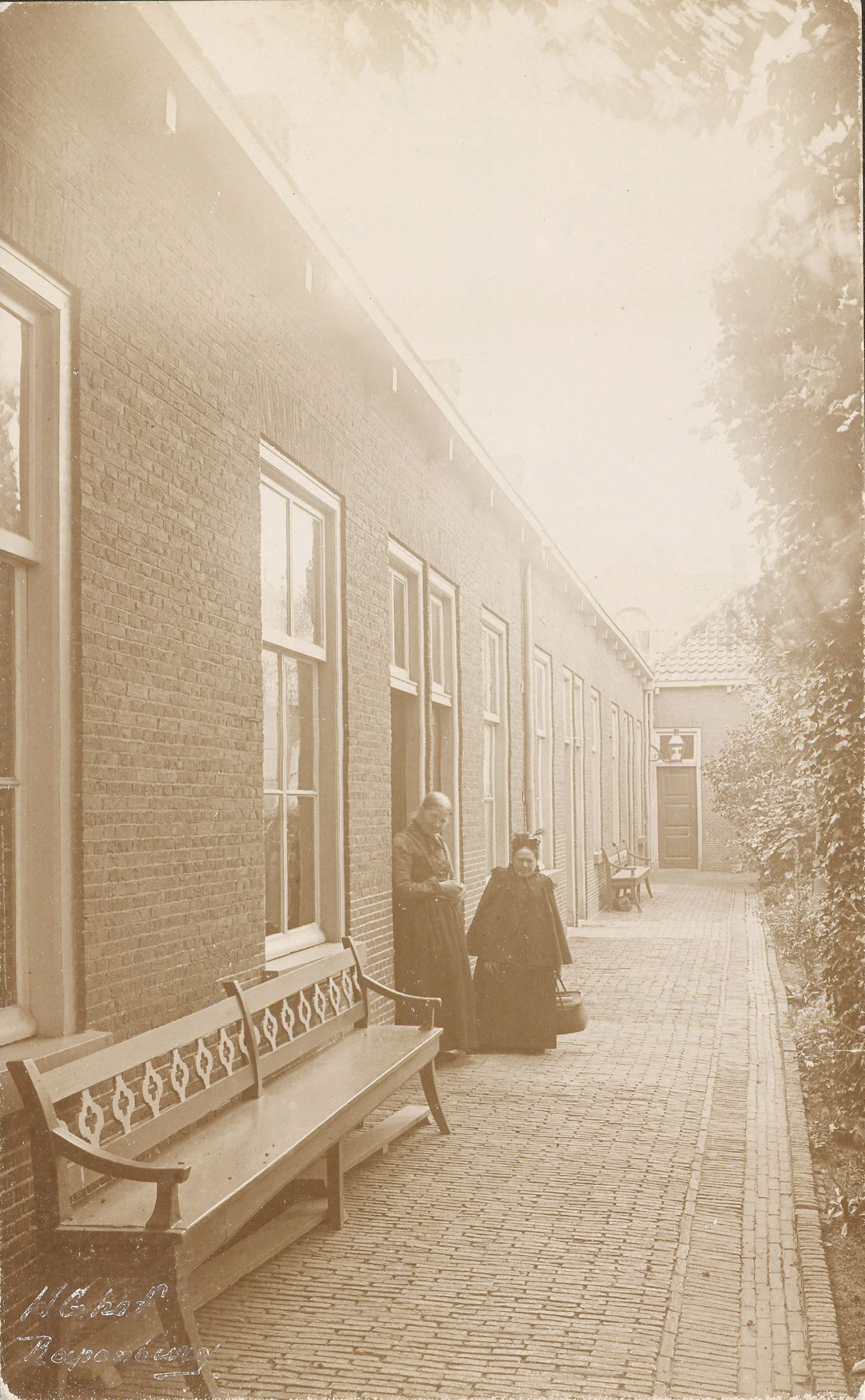 Gezicht op de binnenplaats met enige huisjes van het Heilige Geesthofje aan de Doezastraat.